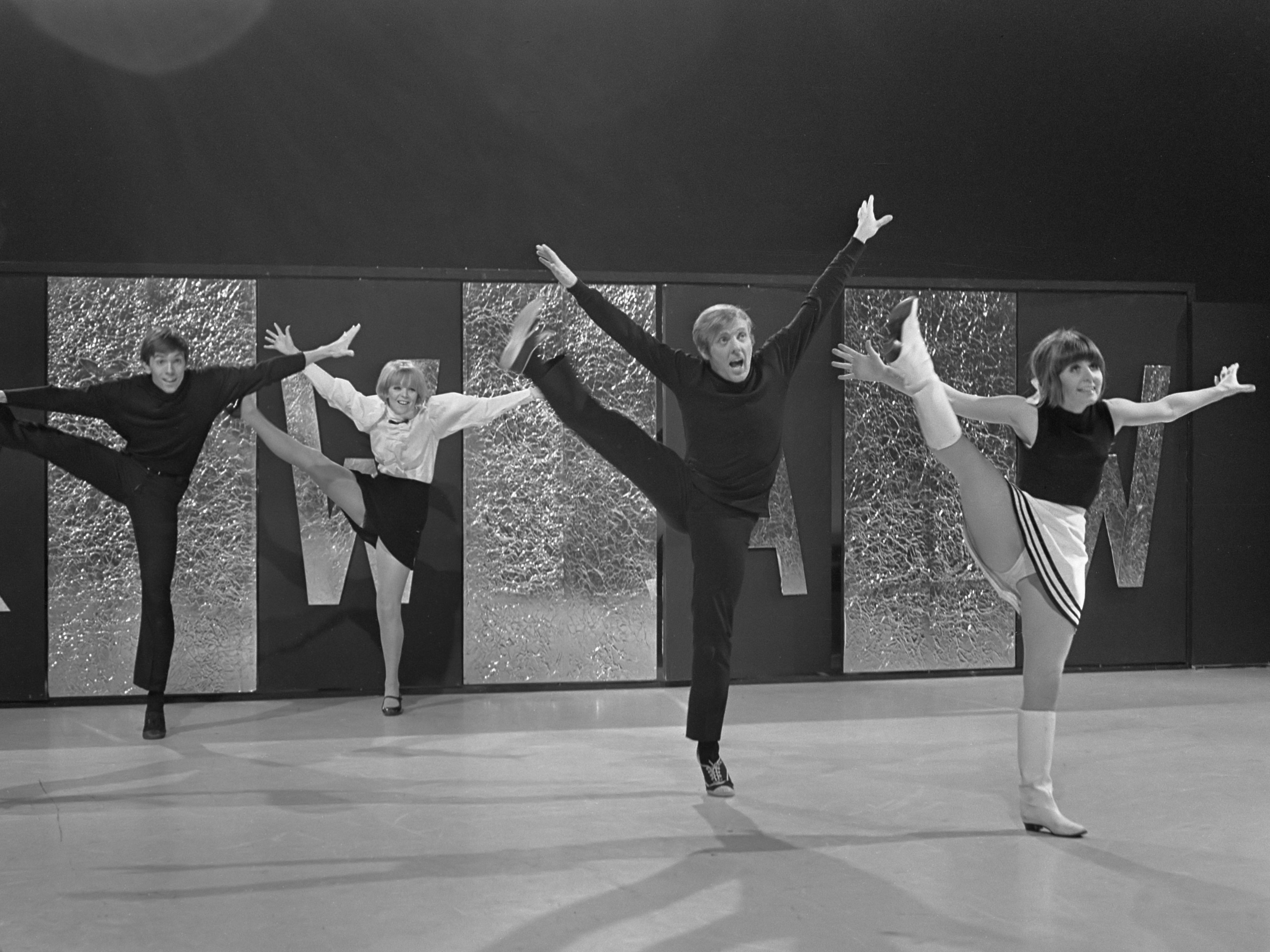 Waauw, tienerprogramma KRO. De dansers van Douglas Squires tijdens show, rechts Douglas Squires 4 januari 1968